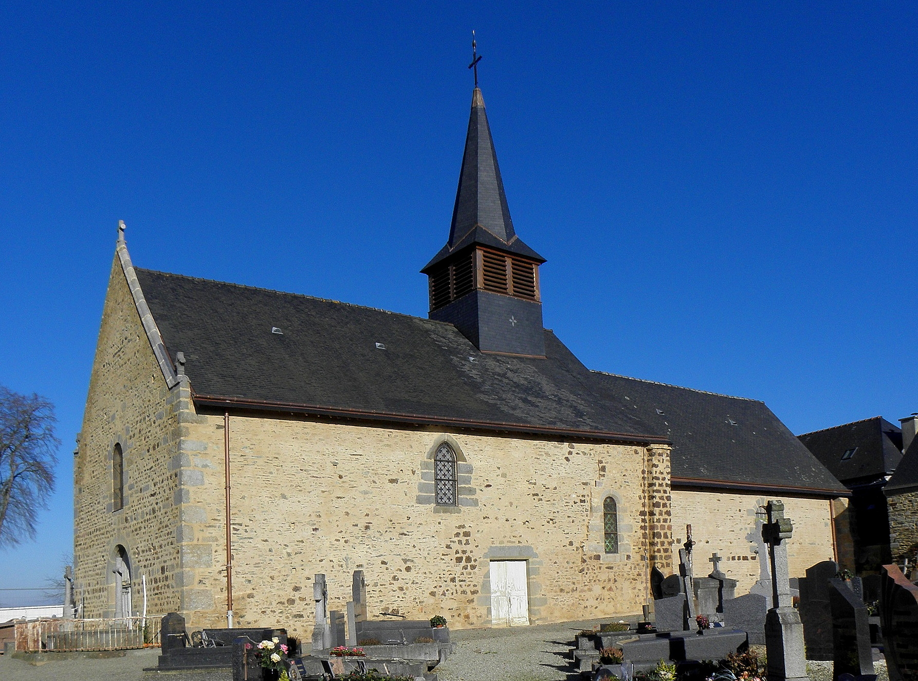 Église de la Présentation de la Vierge d'Aubigné (35). Façade occidentale et flanc sud.